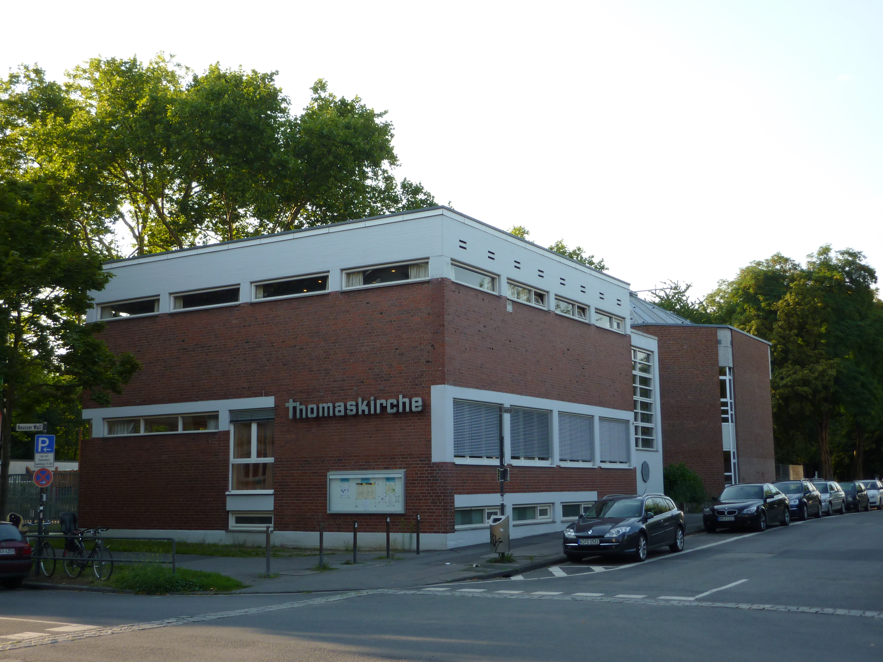 Ev_Thomaskirche_Köln